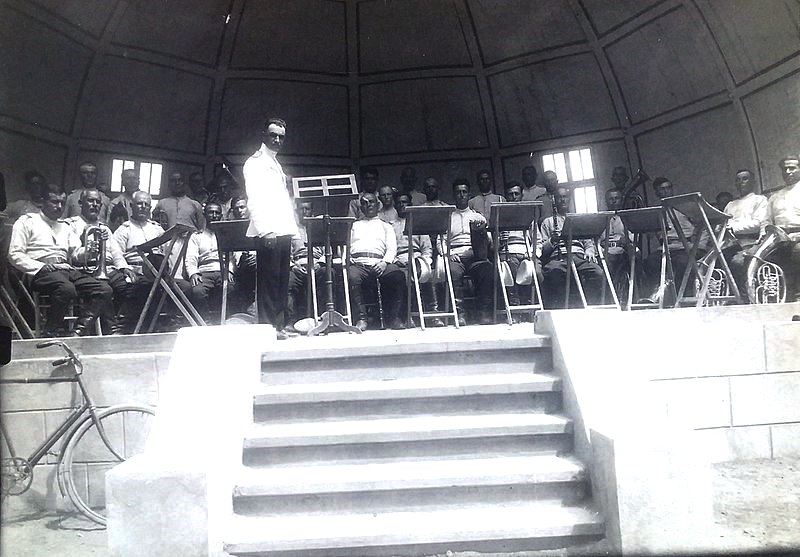 Снимка на военния оркестър на 8-ми Приморски полк пред Морското казино.